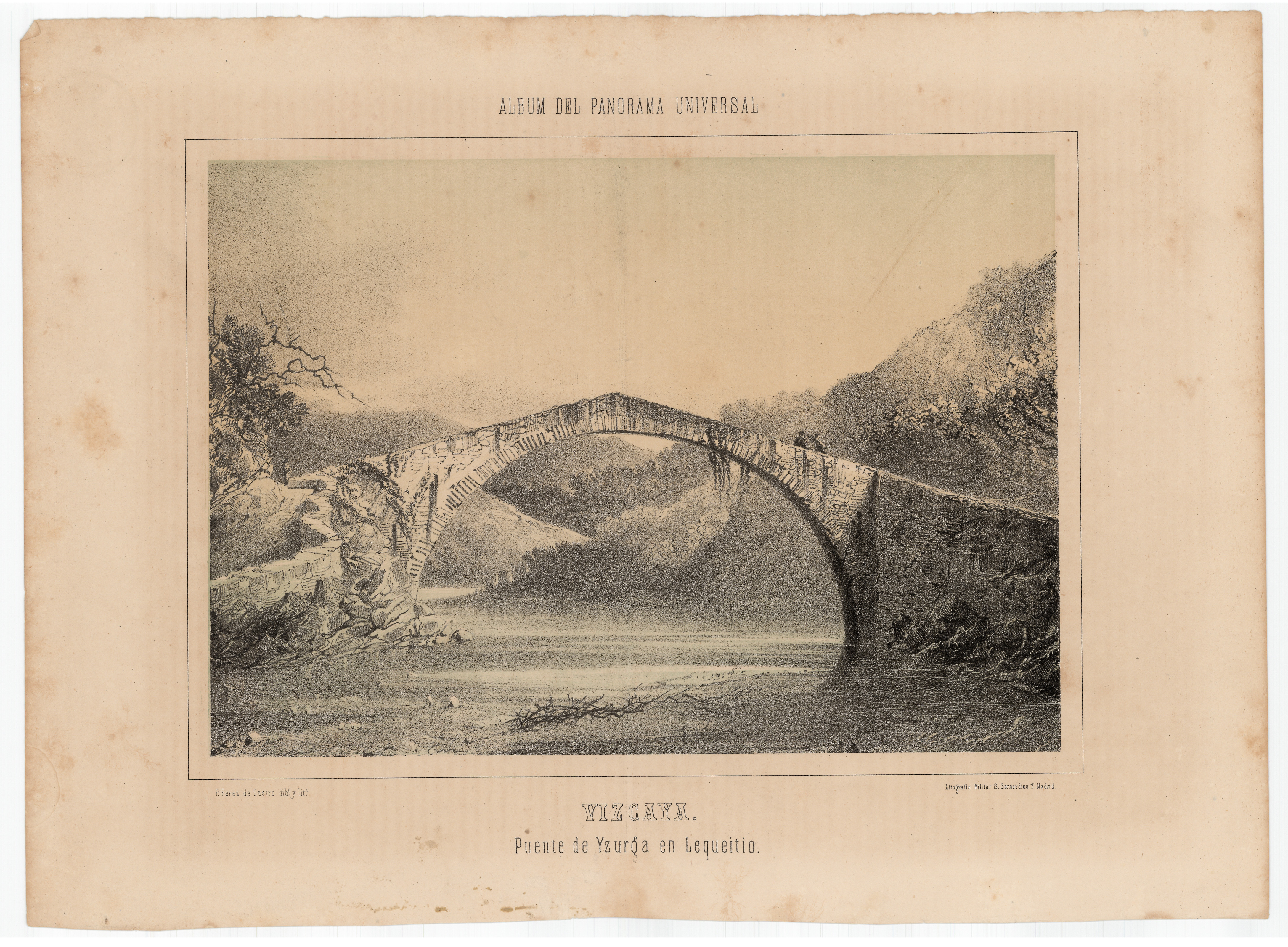 Vizcaya. Puente de Yzurga en Lequeitio, Pedro Pérez de Castro dib. y lit.